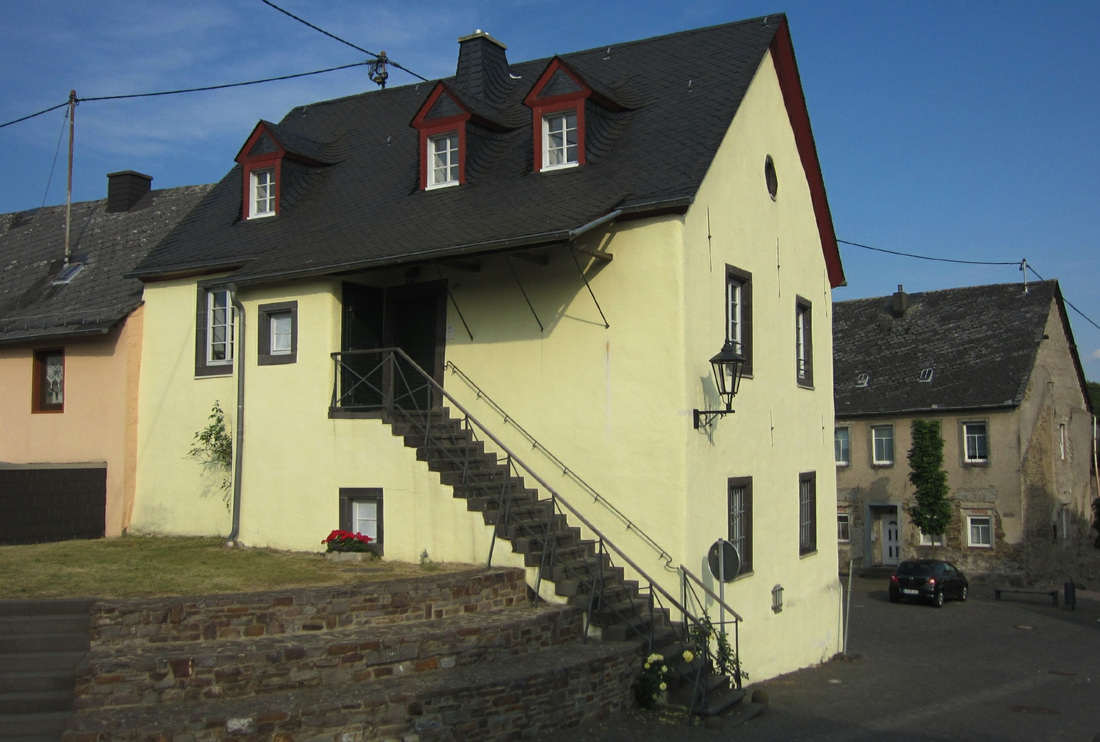 Das alte kurtrierische Amtshaus in Kaisersesch aus nordwestlicher Richtung (2013).